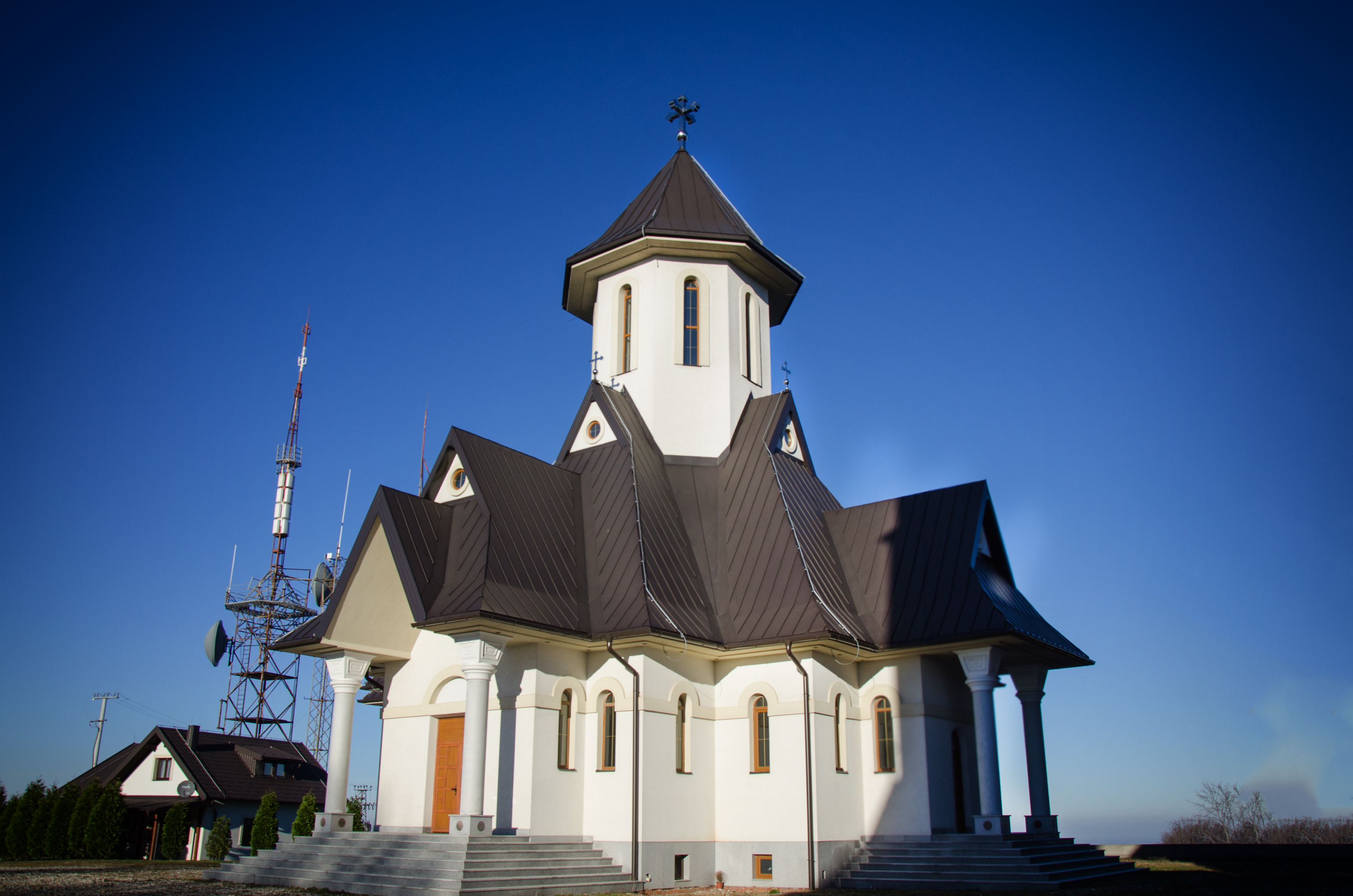 Template:Тос17